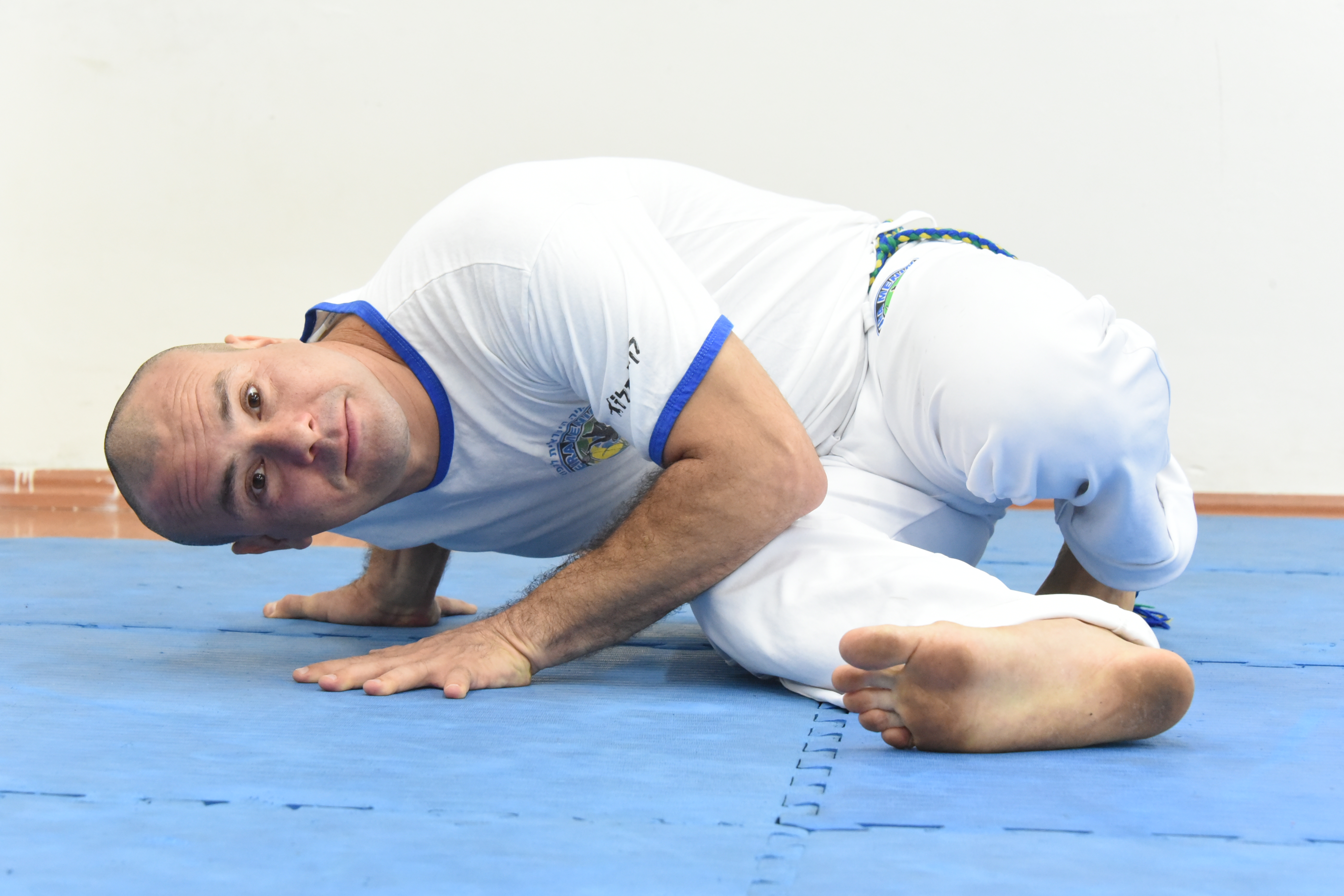 סטודיו קוגומלו 2019